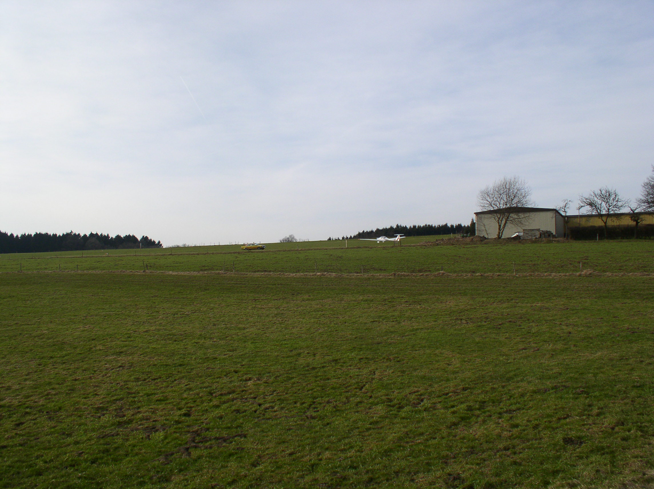 Segelflughafen Im Heede in Halver